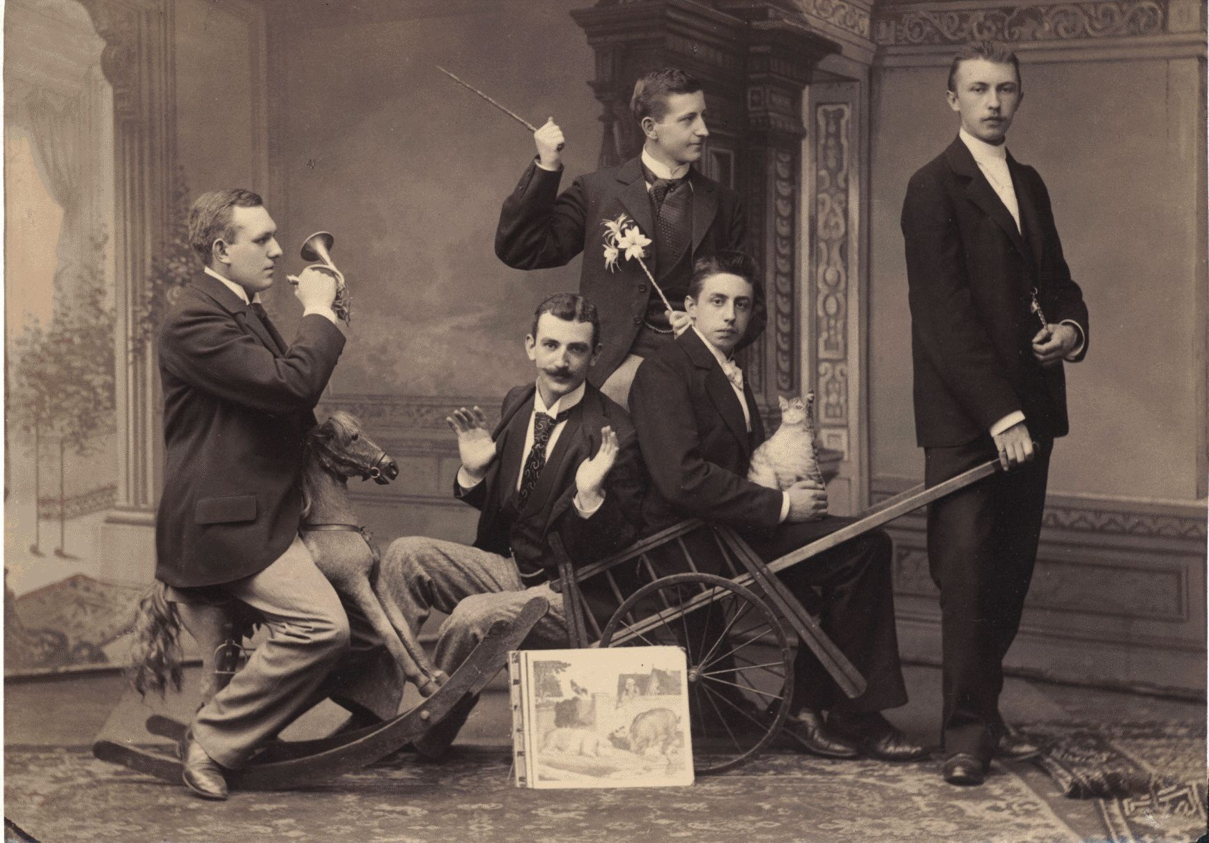 Vorstand der K.St.V. Arminia Bonn im Wintersemester 1896/97, rechts Konrad Adenauer